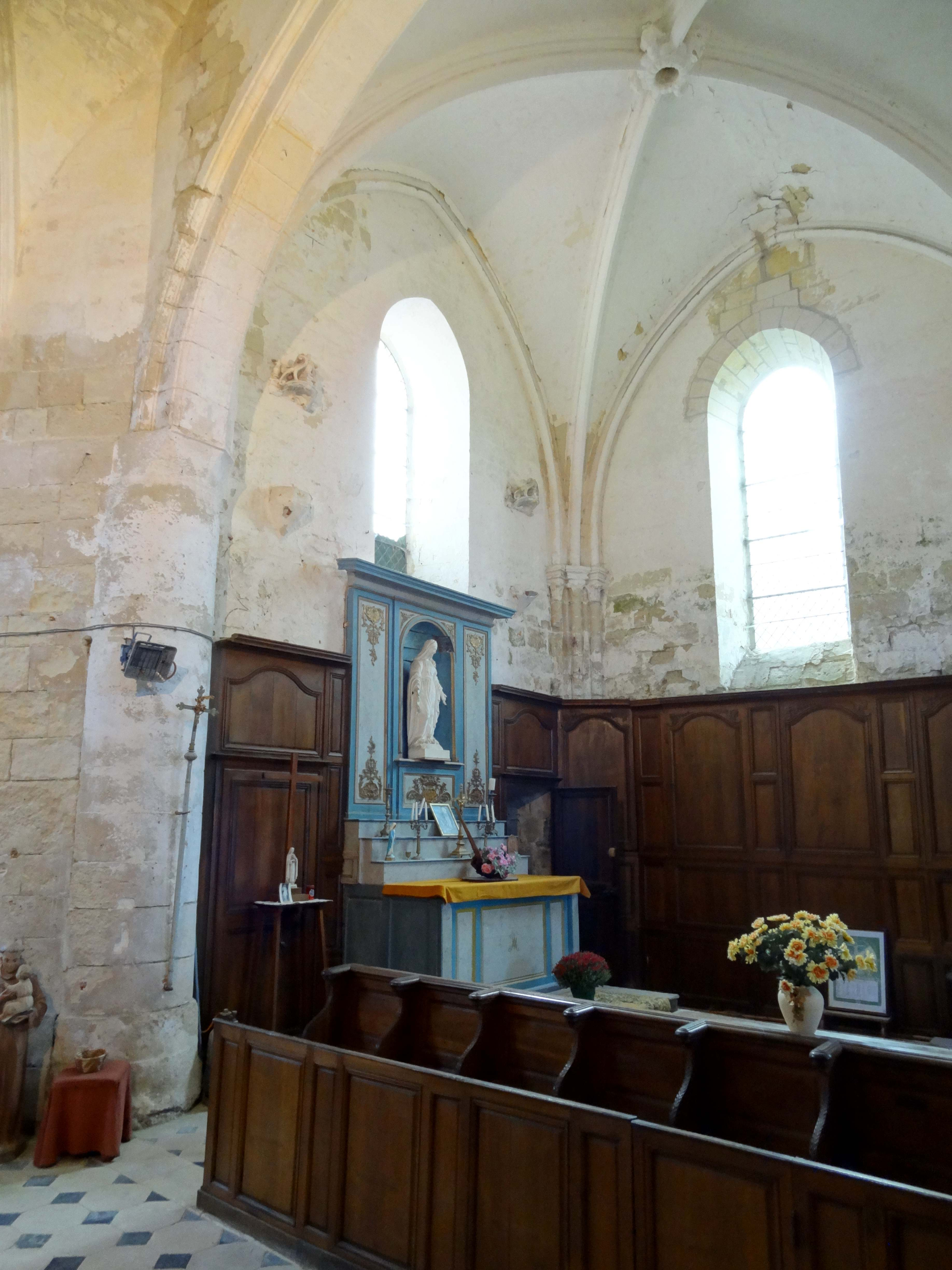 Intérieur de l'église - voir titre.